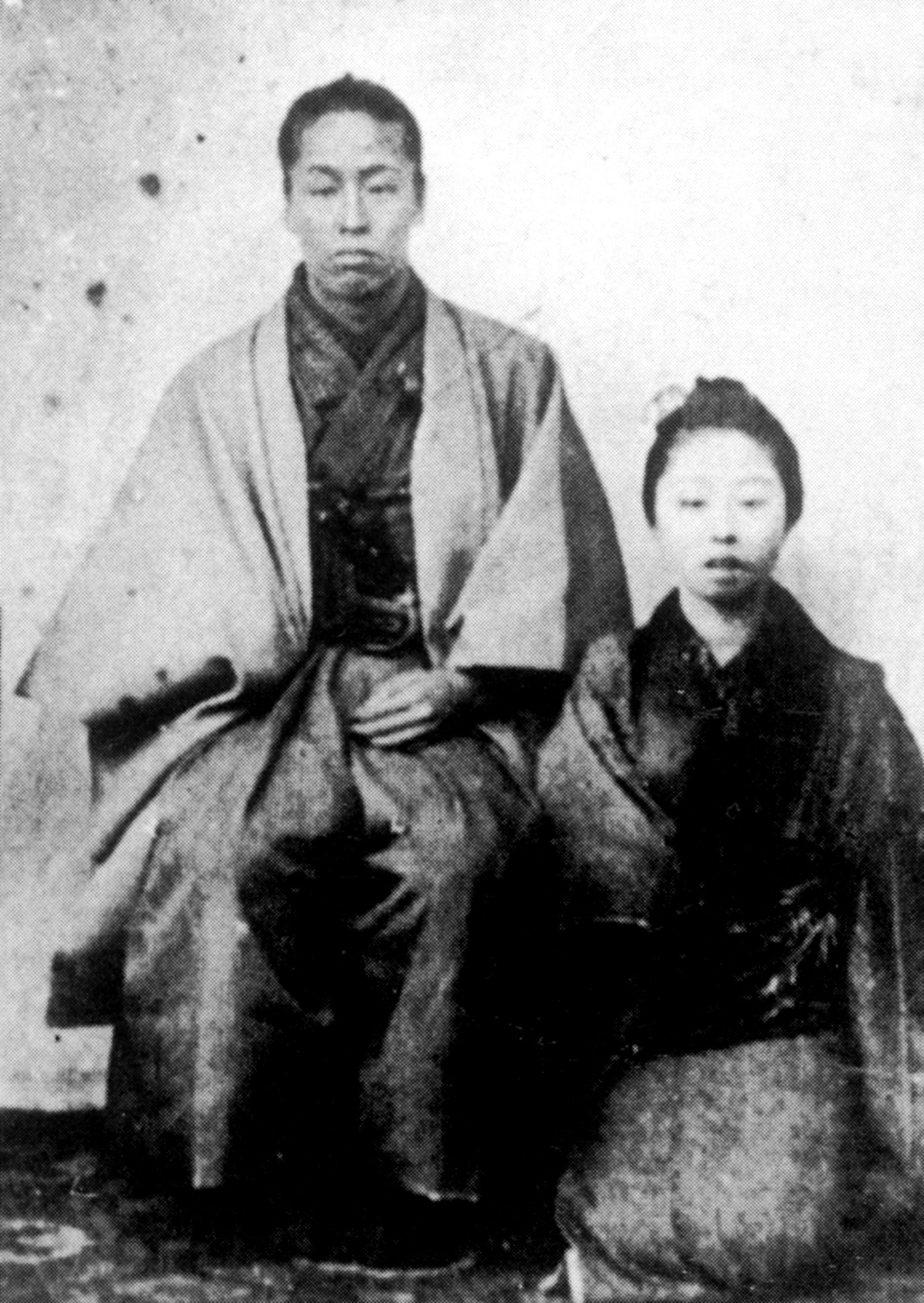 中村半次郎 人切り半次郎時代の写真。右の人物は大阪の煙草屋の娘さと。